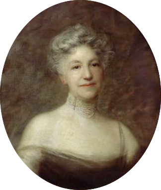 Eudoxie Asselin (1855-1942), épouse d'Henri Schneider